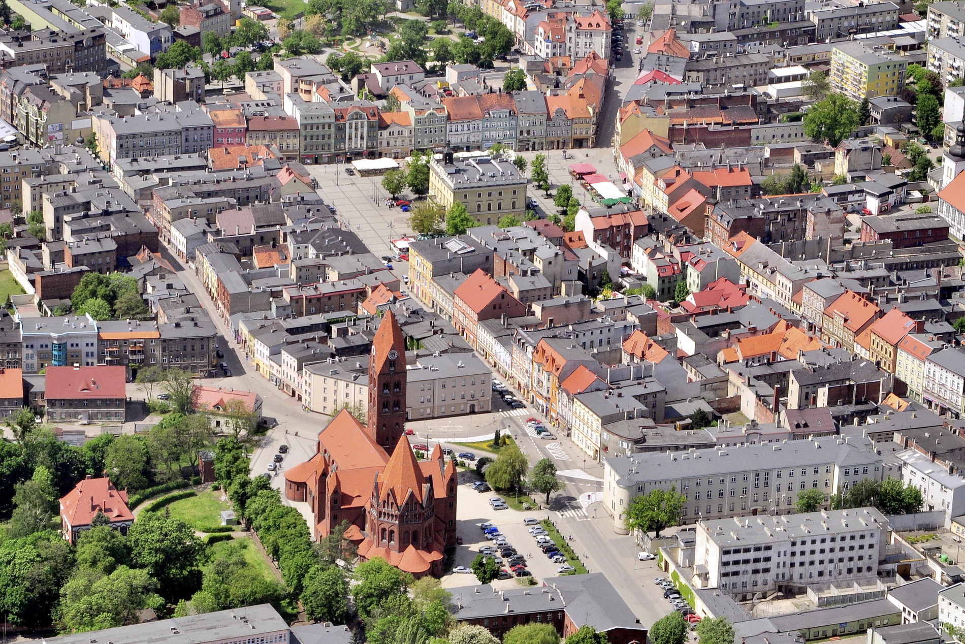 Ostrów Wielkopolski, układ urbanistyczny, 1404, XVIII (1714)